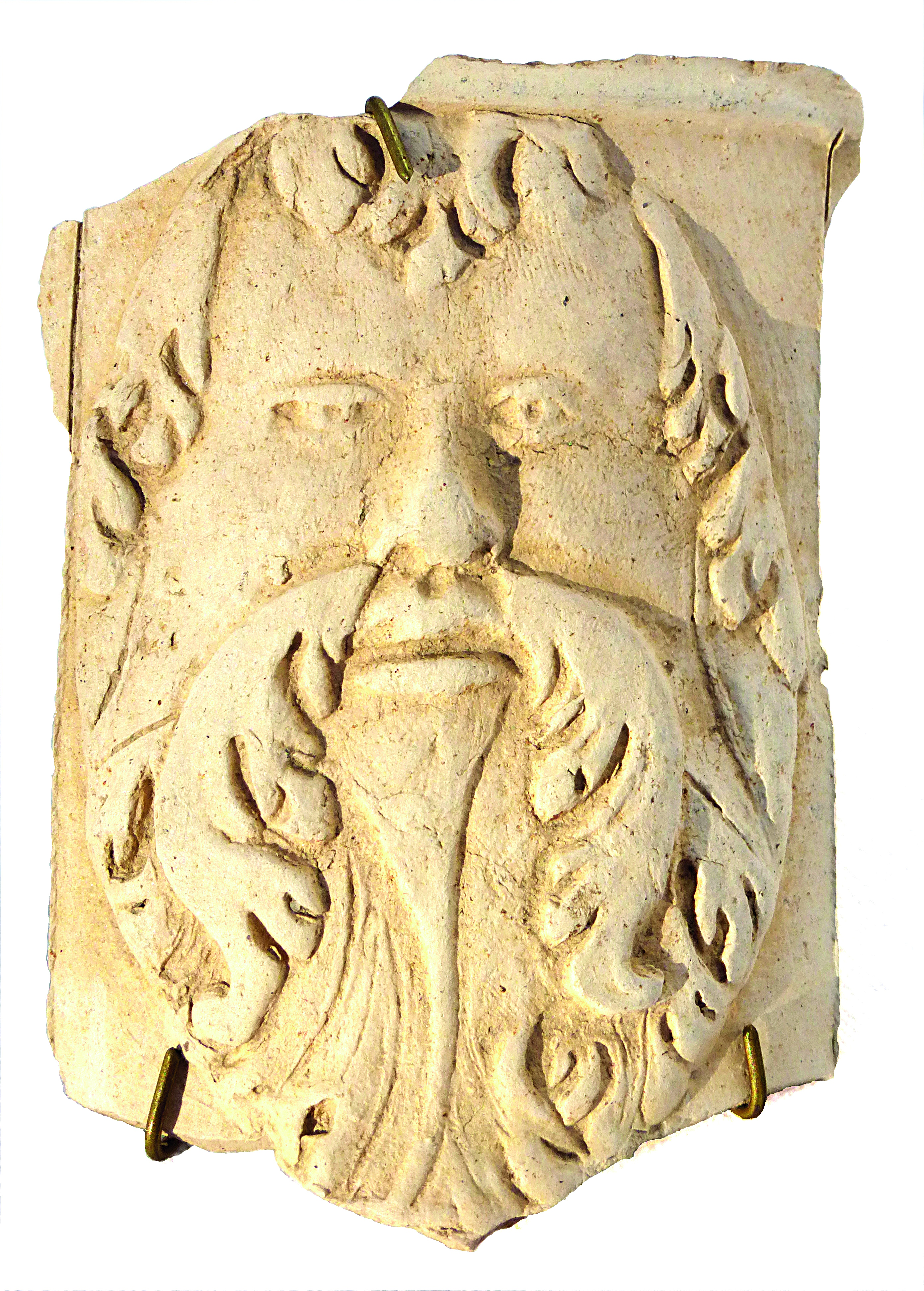 Groteske aus Gschaid